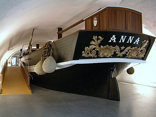 Poppa del brigantino Anna, presso il Museo del mare di Genova - Italia.